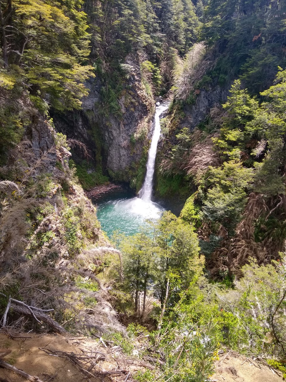 Foto tomada en bosque en donde se encuentra la casacada de Rio Bonito